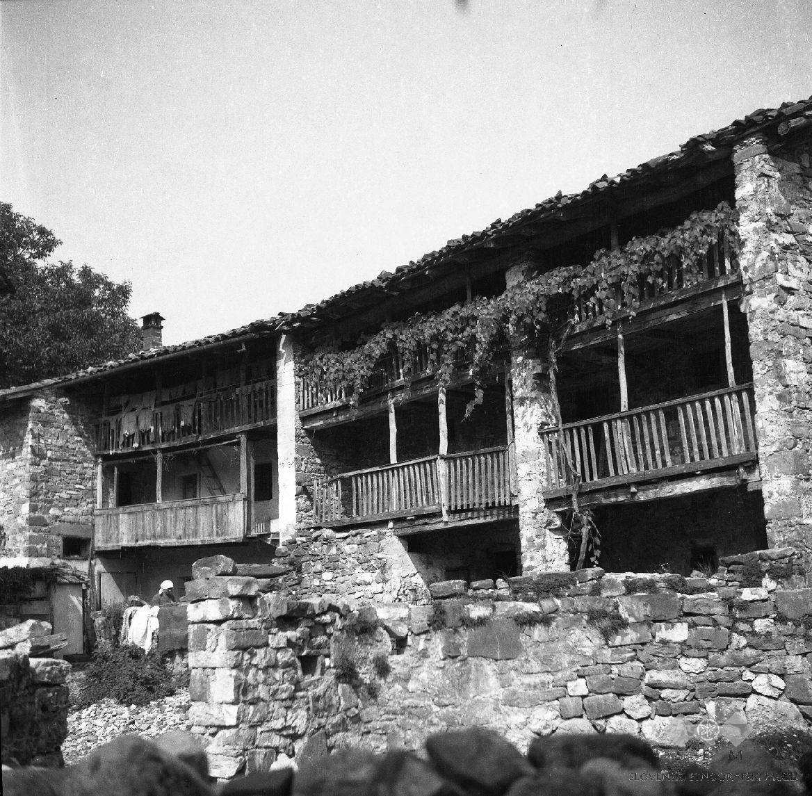 Podbela 29, pri Baluštju , stanovanjska hiša levo. Desno hlev in skedenj, last druge hiše št. 31, pri Skočirju.